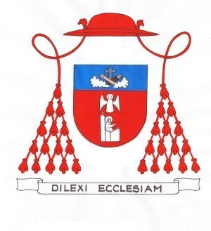 Brasão Cardinalício de Umberto Betti